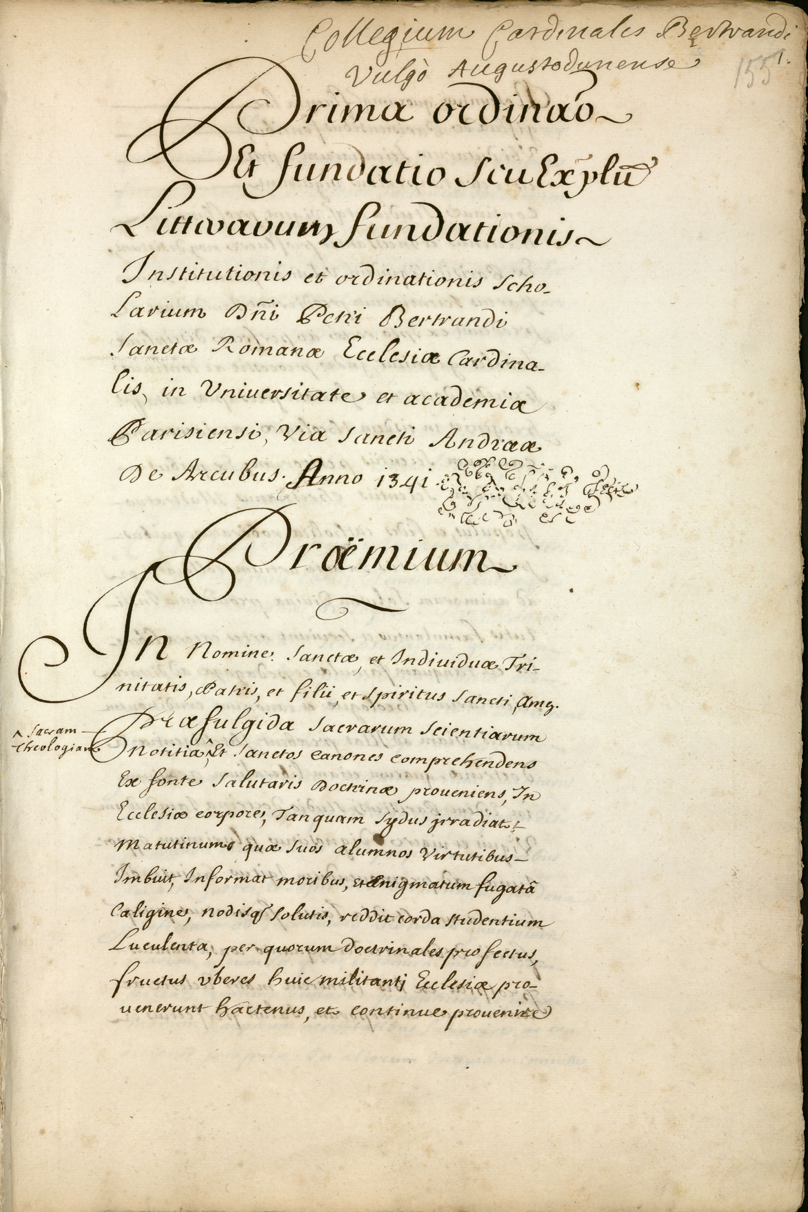 Manuscrit en latin, dans un registre de 738 feuillets consacré aux fondations et statuts des collèges.